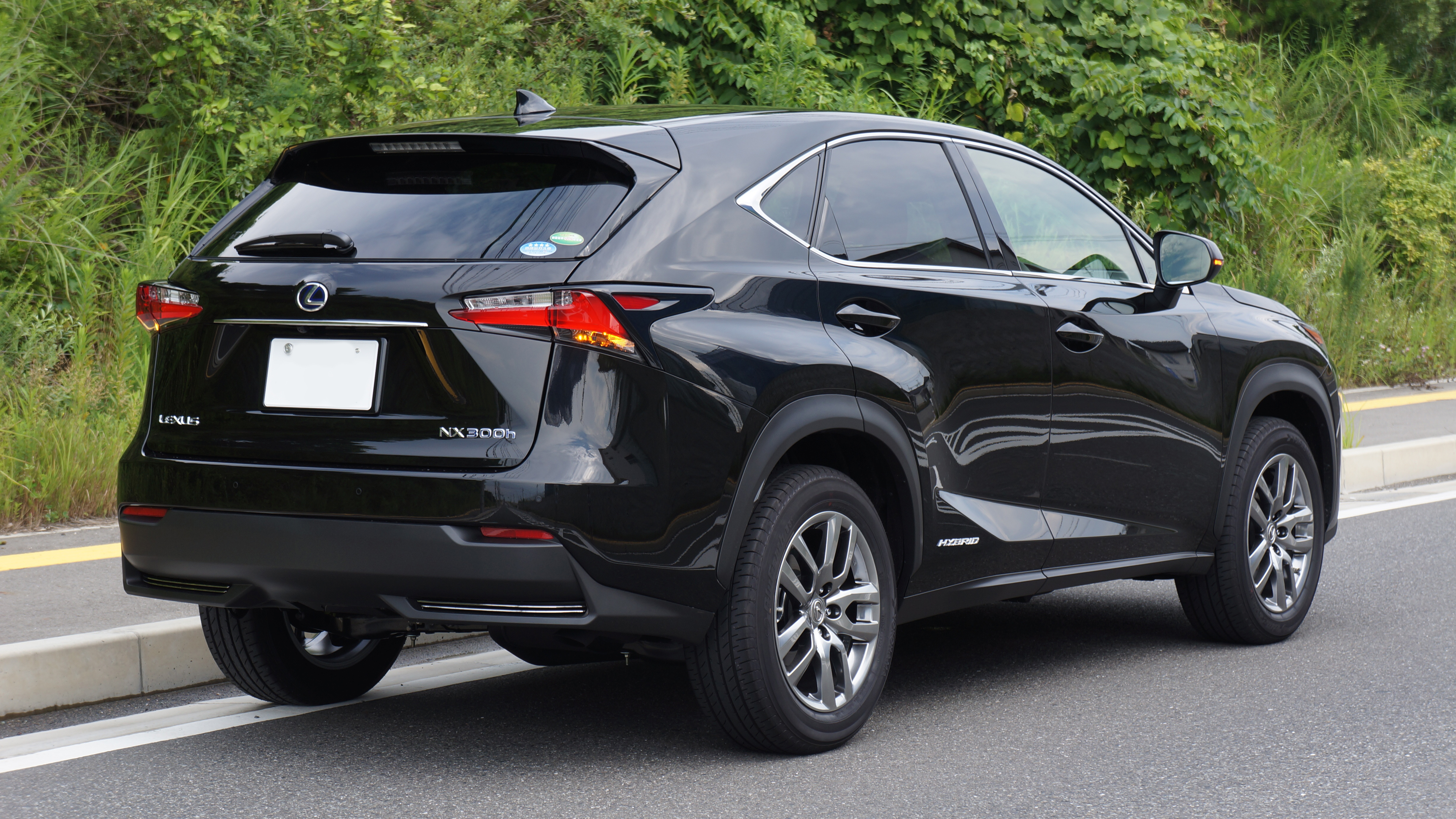 LEXUS NX300h Japan 2014 Rear